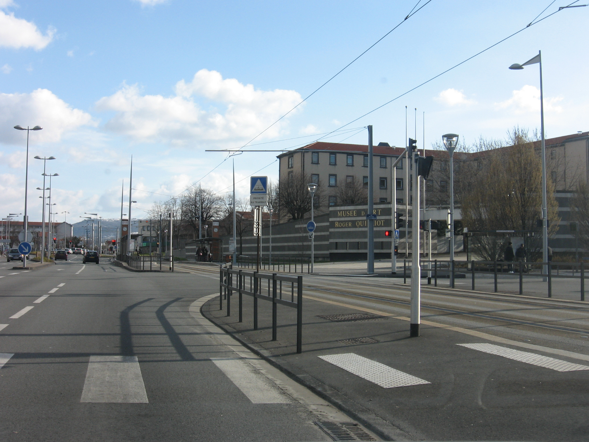 Clermont-Ferrand, Puy-de-Dôme